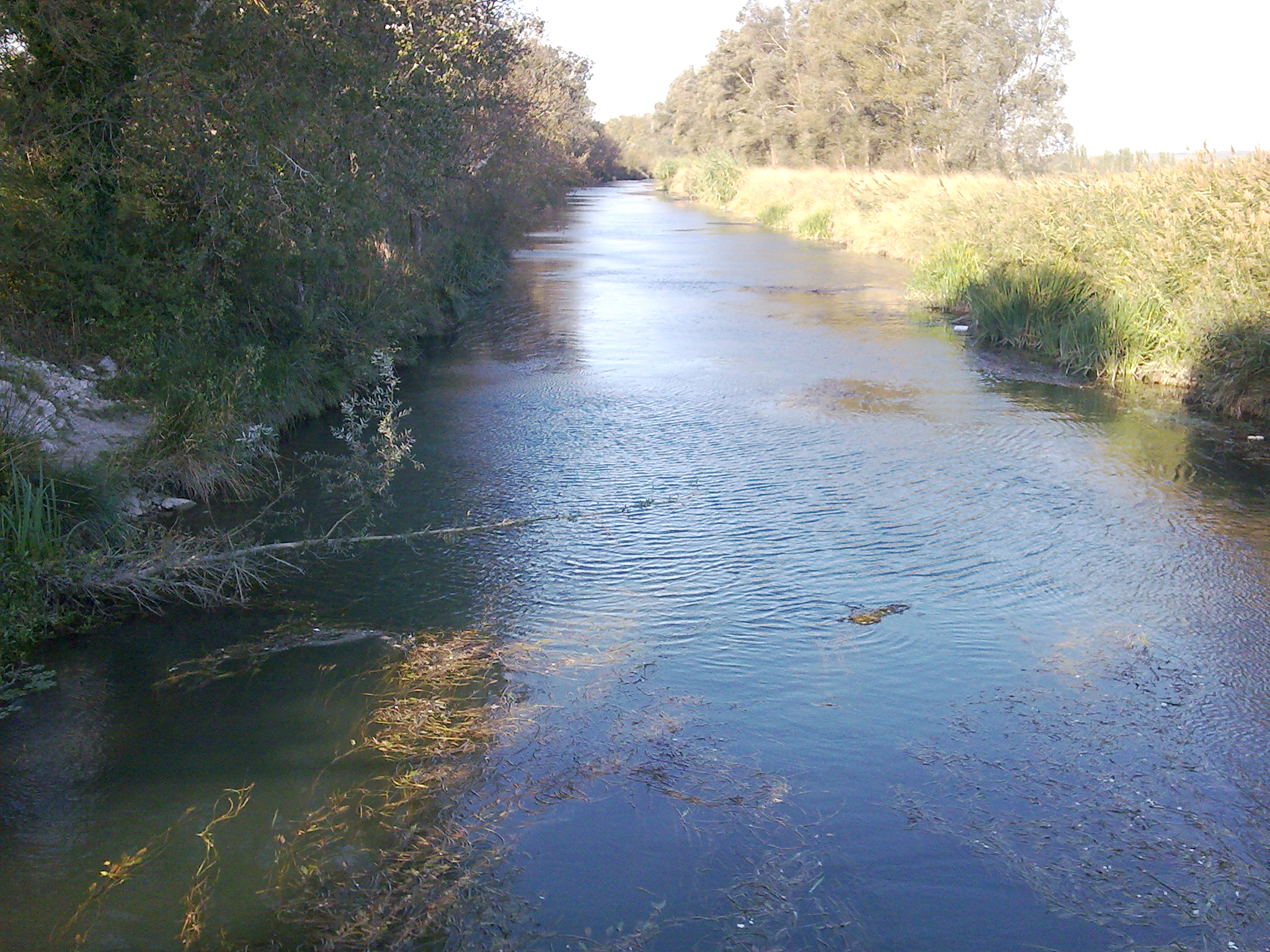 Canal de la Vallée des Baux (Maussane-les-Alpilles)